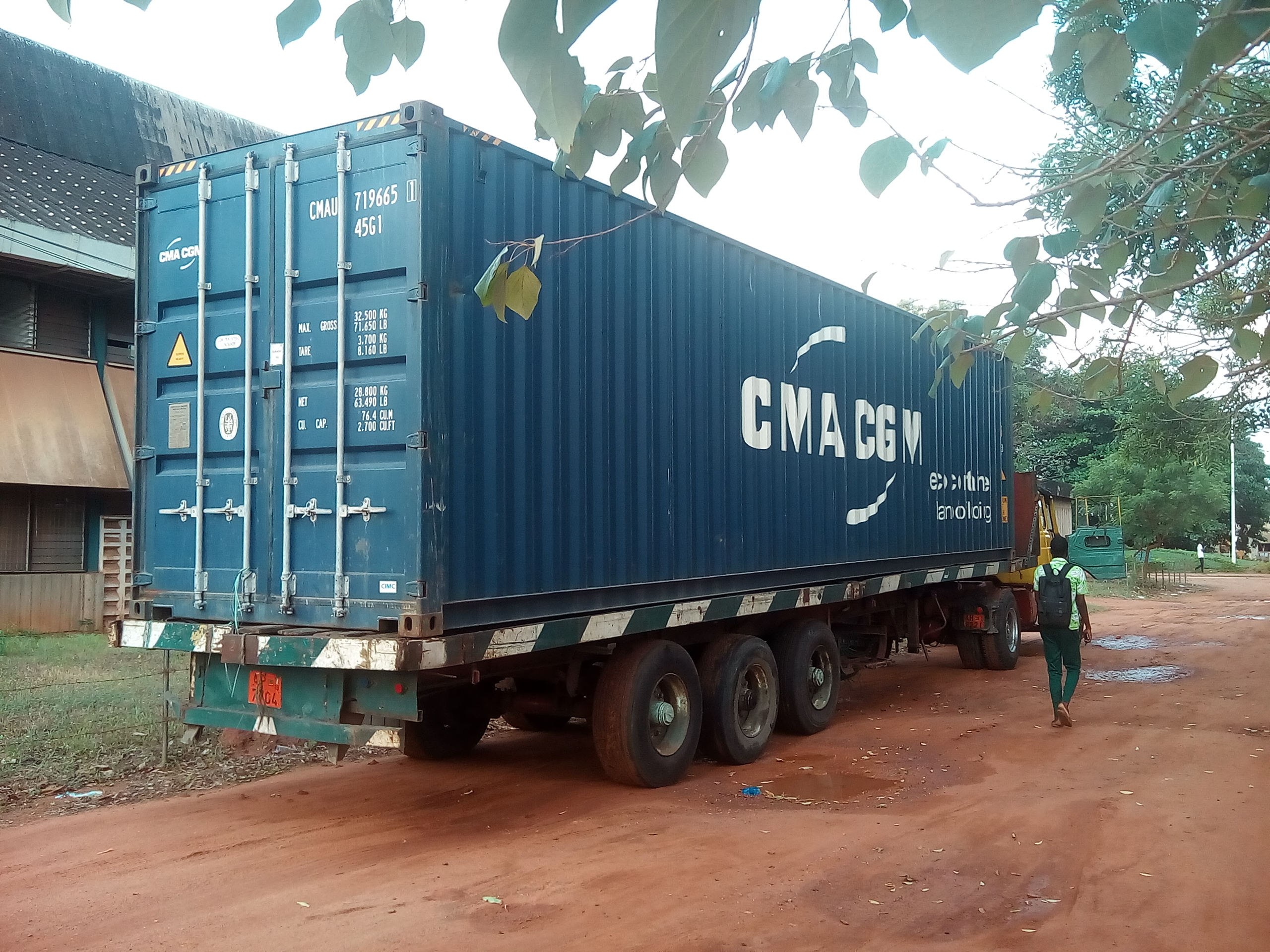 Moyens de transport pour les conteneurs. This is an image with the theme "Africa on the Move or Transport" from: Benin